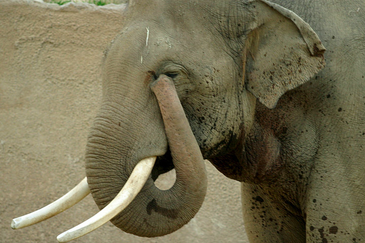 elephant trunk